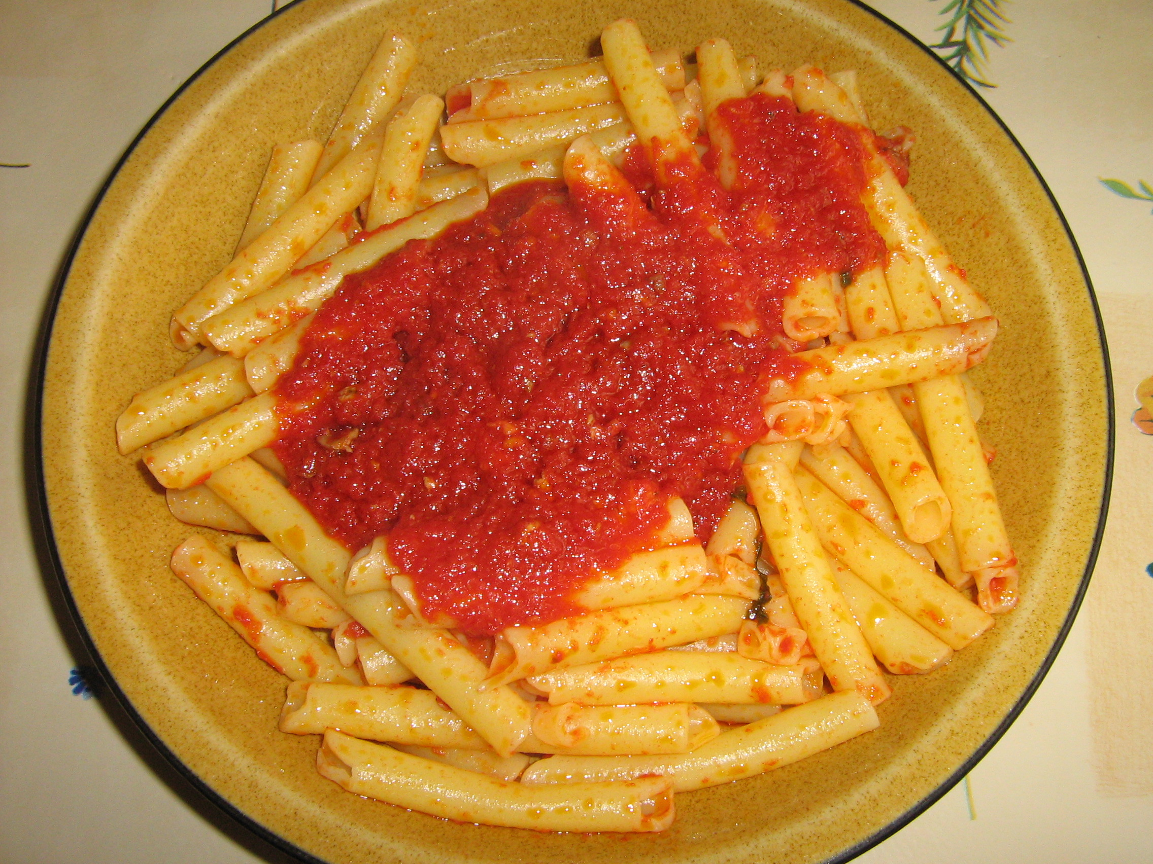 Primi